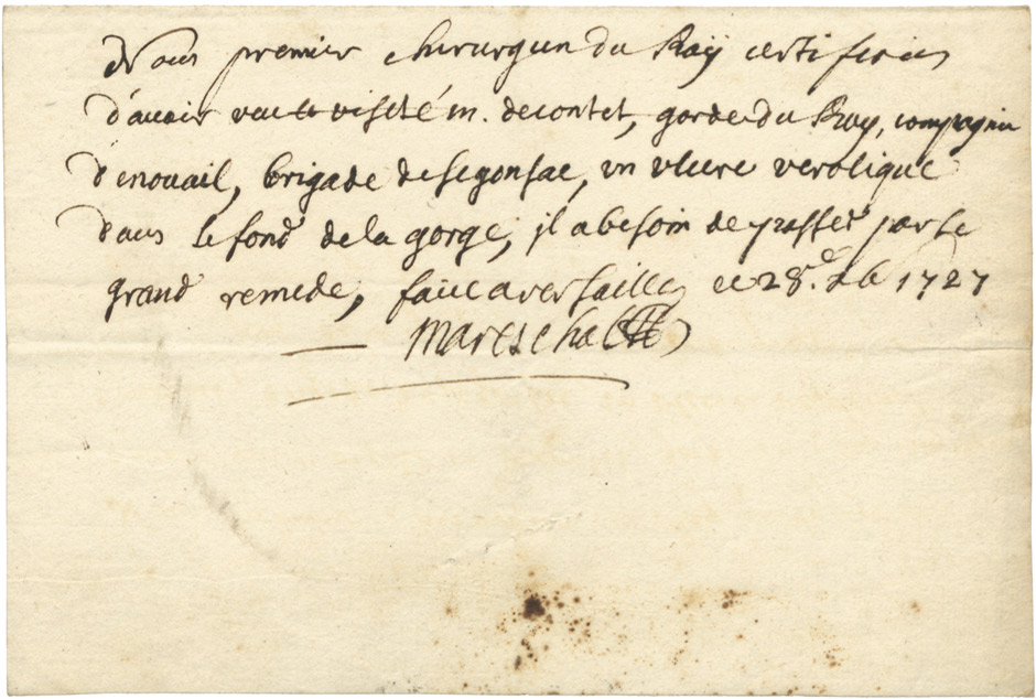 Eigenhändiges Attest mit Unterschrifft "Marechal". Versailles 28.IX.1727. - "Nous premier chirurgien du Roy certiferons d'avoir ... visité M. Decontet, garde du Roy, compagnie d'enouail, brigade de segonsac, un ulcere verolique dans le fond de la gorge, il a besoin de passer par le grand remede ...".